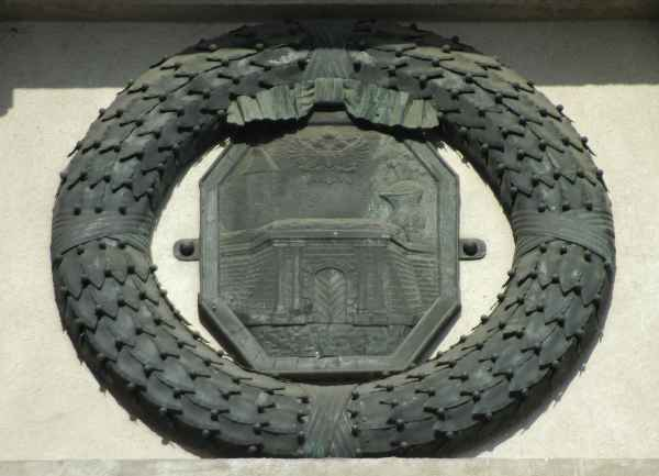 Äußeres Burgtor Lorbeerkranz mit Wappen